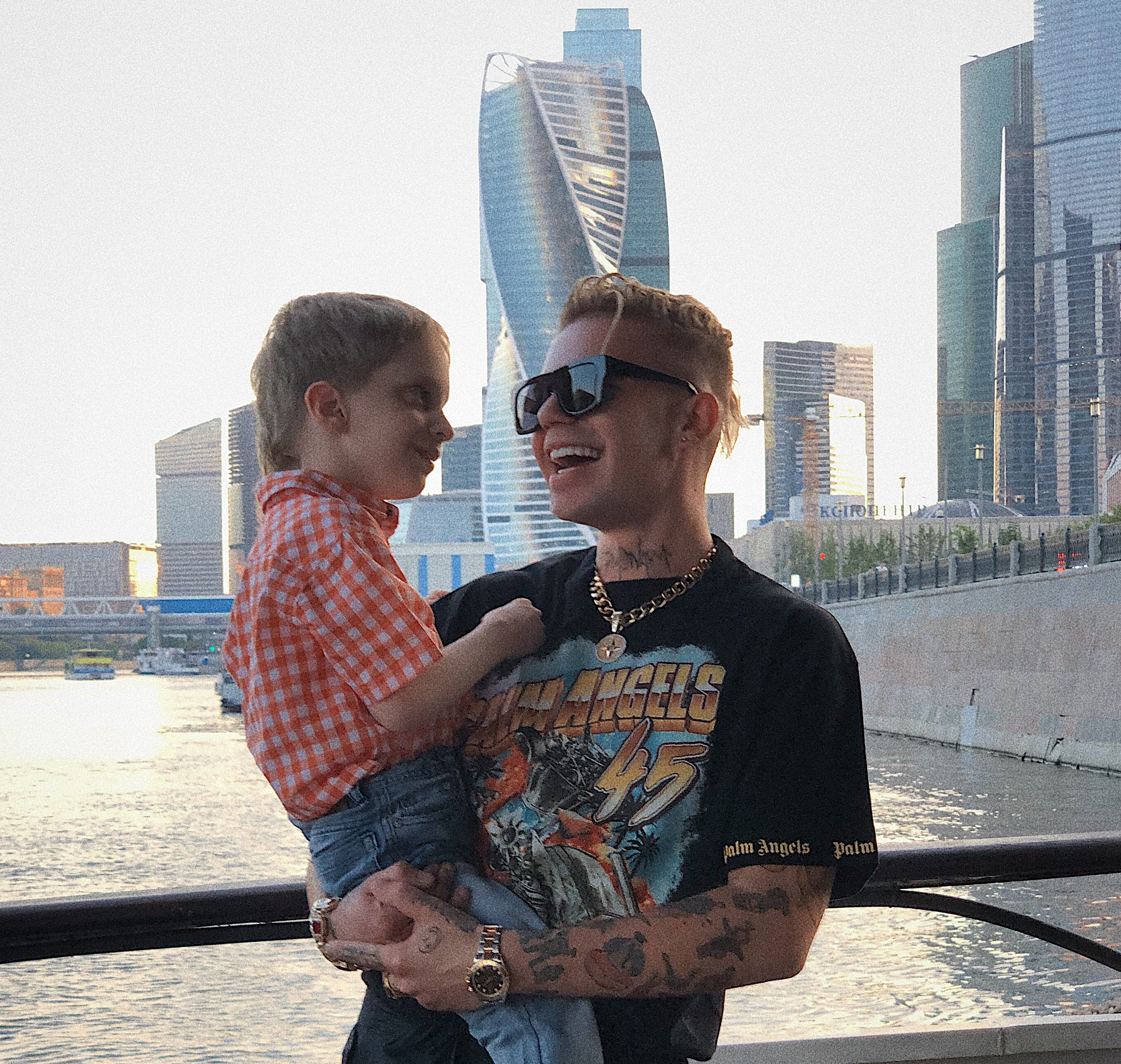 Рэпер Элджей и мальчик Сережа, прославившийся своими каверами на музыканта. Дружеская встреча.